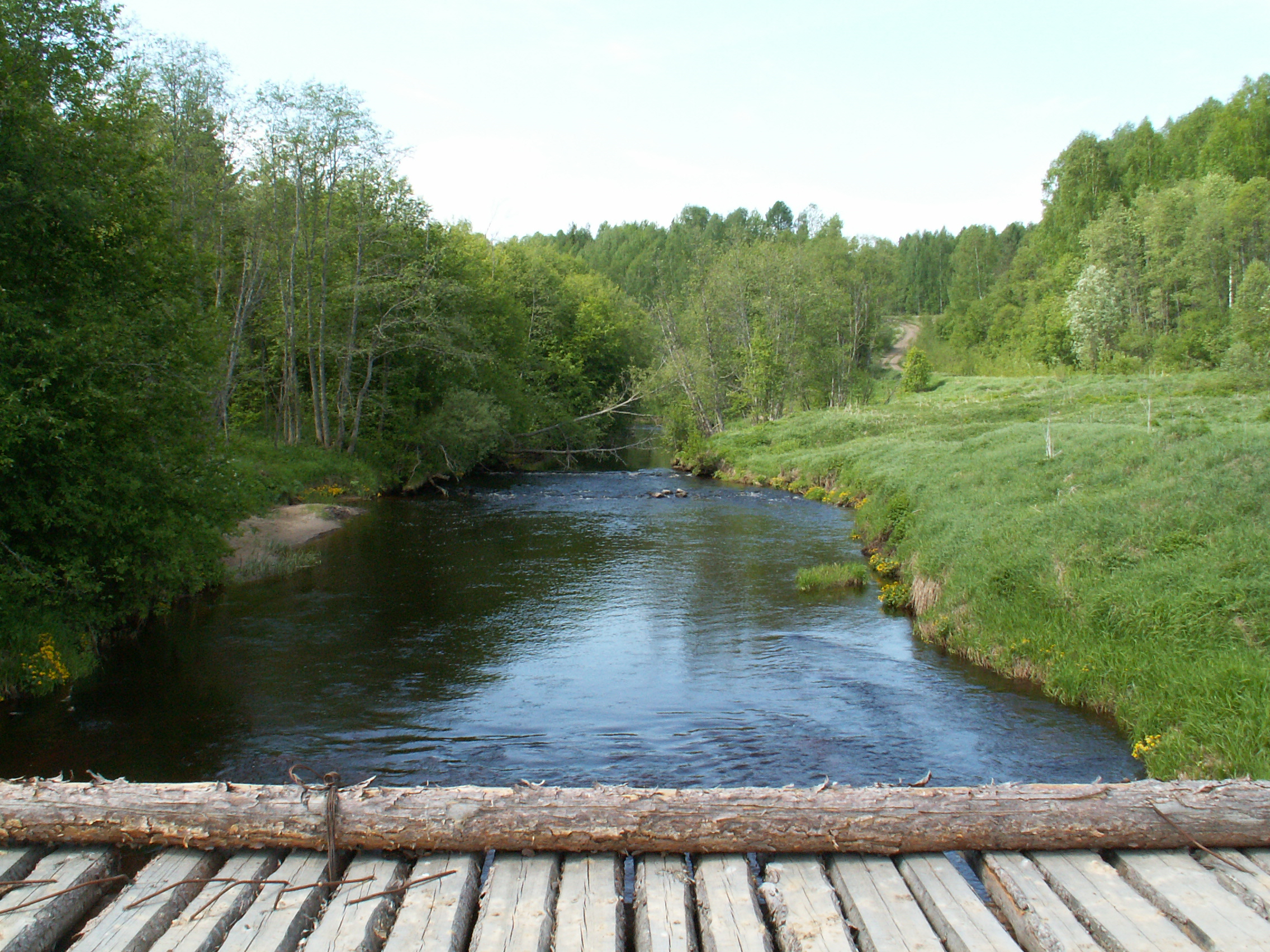 река Ненюшка с моста